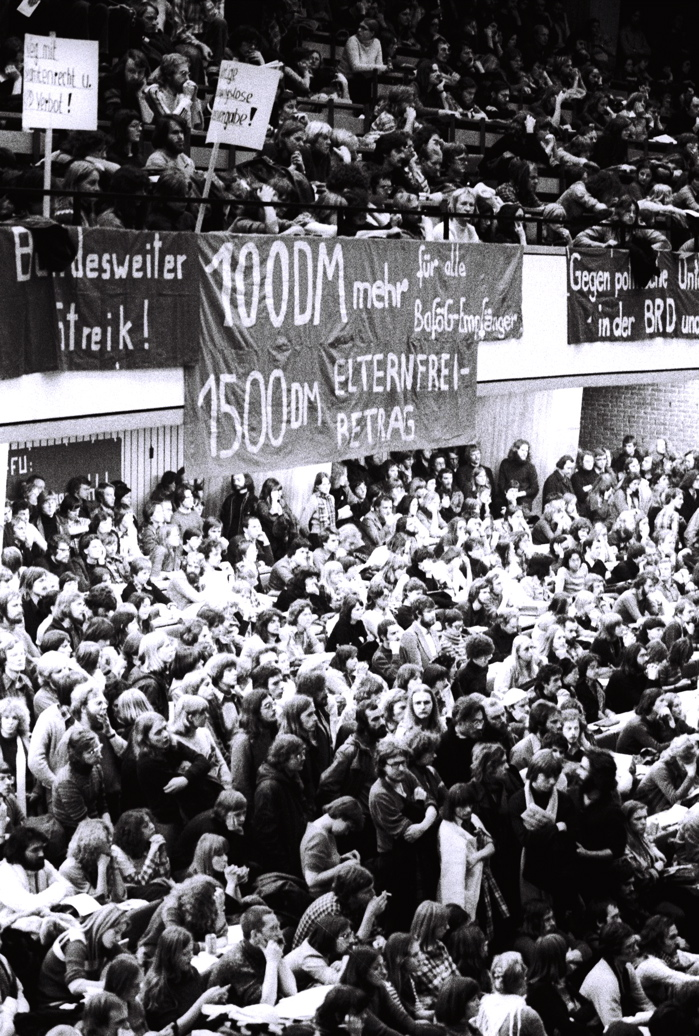 Bundesweiter Streik der Universitäten und Fachhochschulen 1976 / 77:/br Vollversammlung der Studenten am 24. November 1976 im Audimax der Freien Universität Berlin (FU).